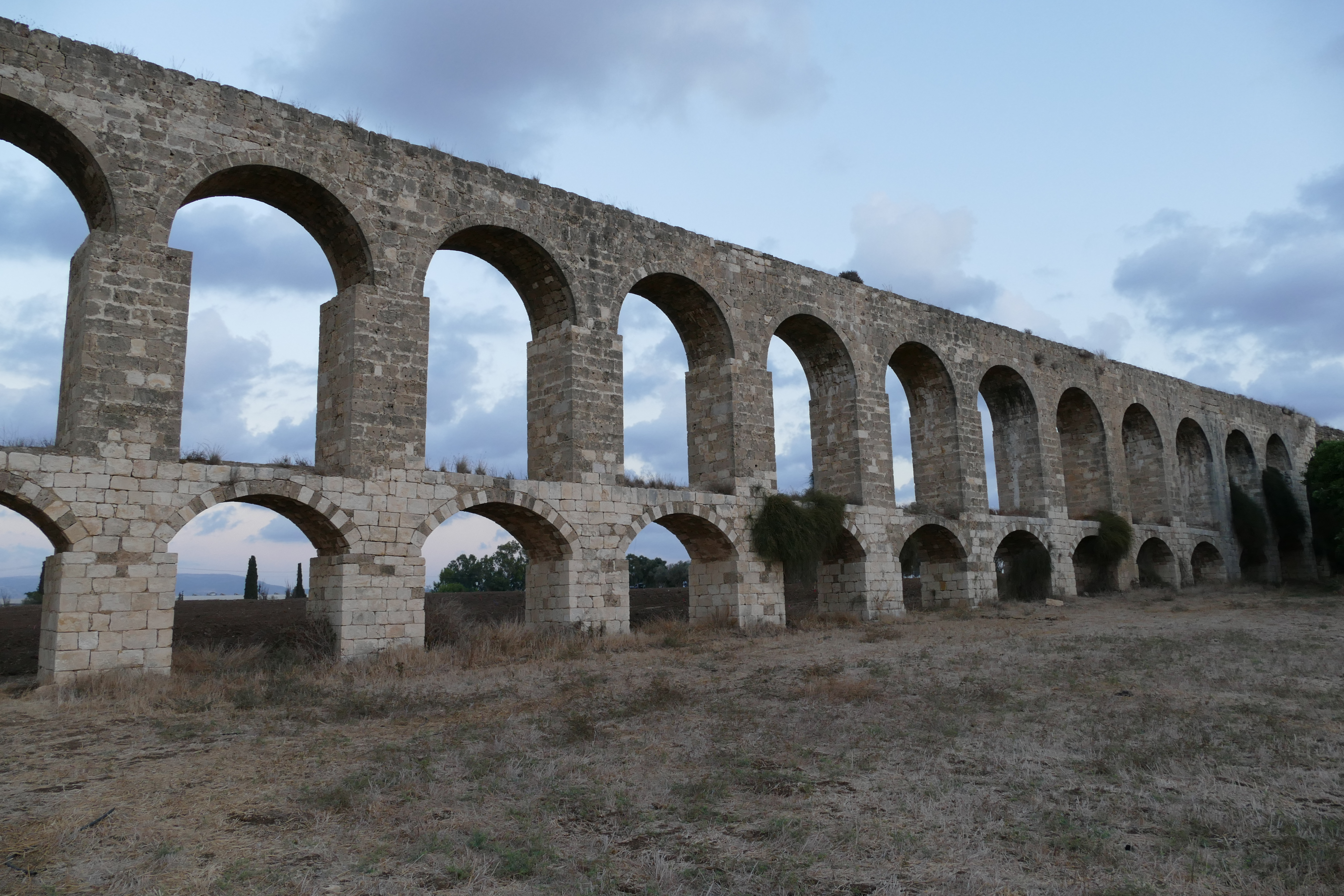 אמת עכו היא אמת מים שהובילה מים מאזור כברי אל העיר עכו. אמה זו ששרידיה נראים עד היום בתחומי העיר עכו ומצפון לה, נבנתה על ידי סולימאן פאשה, והייתה האמה השלישית ששירתה את העיר. קדמו לה אמה הלניסטית ואמה שהוקמה על ידי אחמד אל-ג'זאר ונהרסה בידי נפוליאון בשנת 1799.